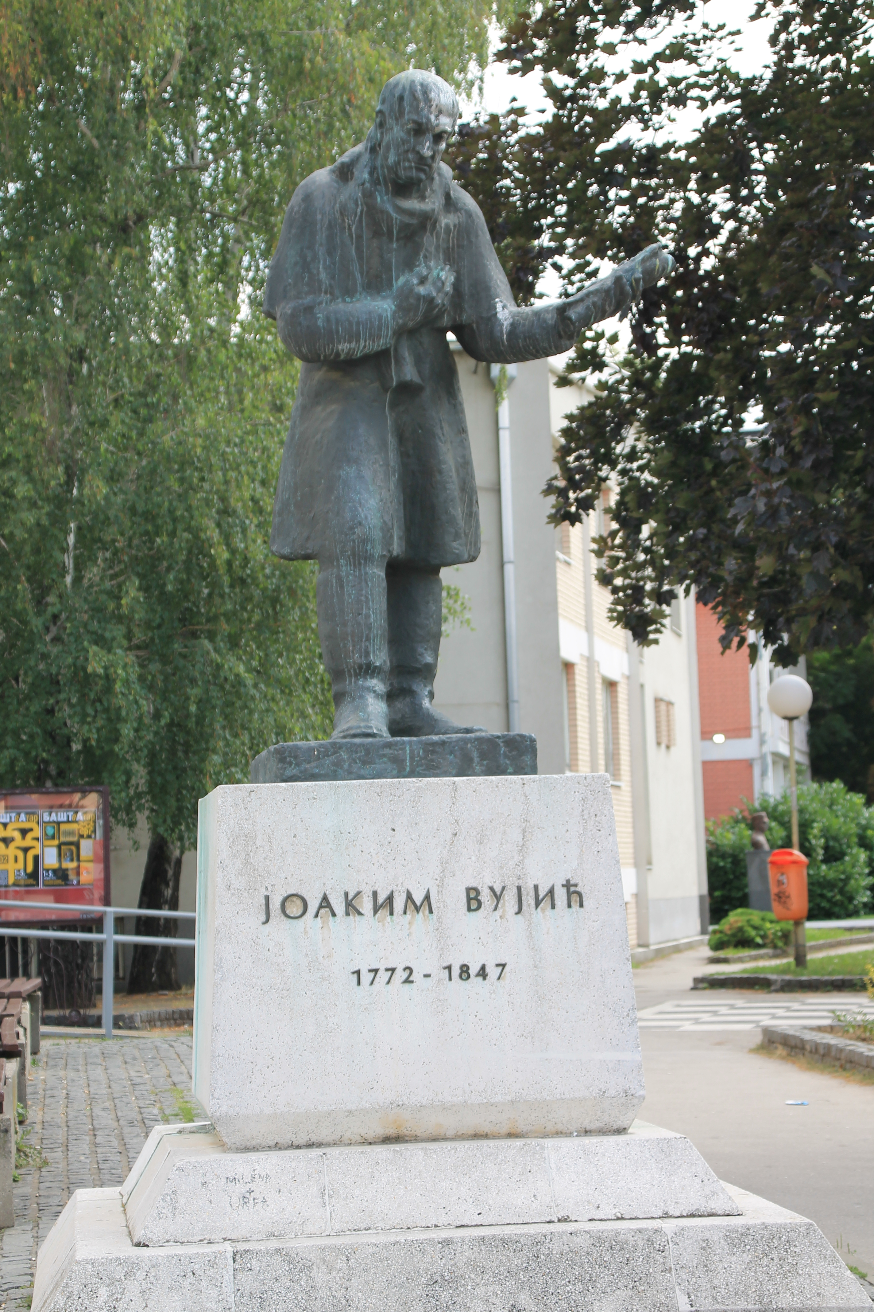 Knjaževsko-srpski teatar